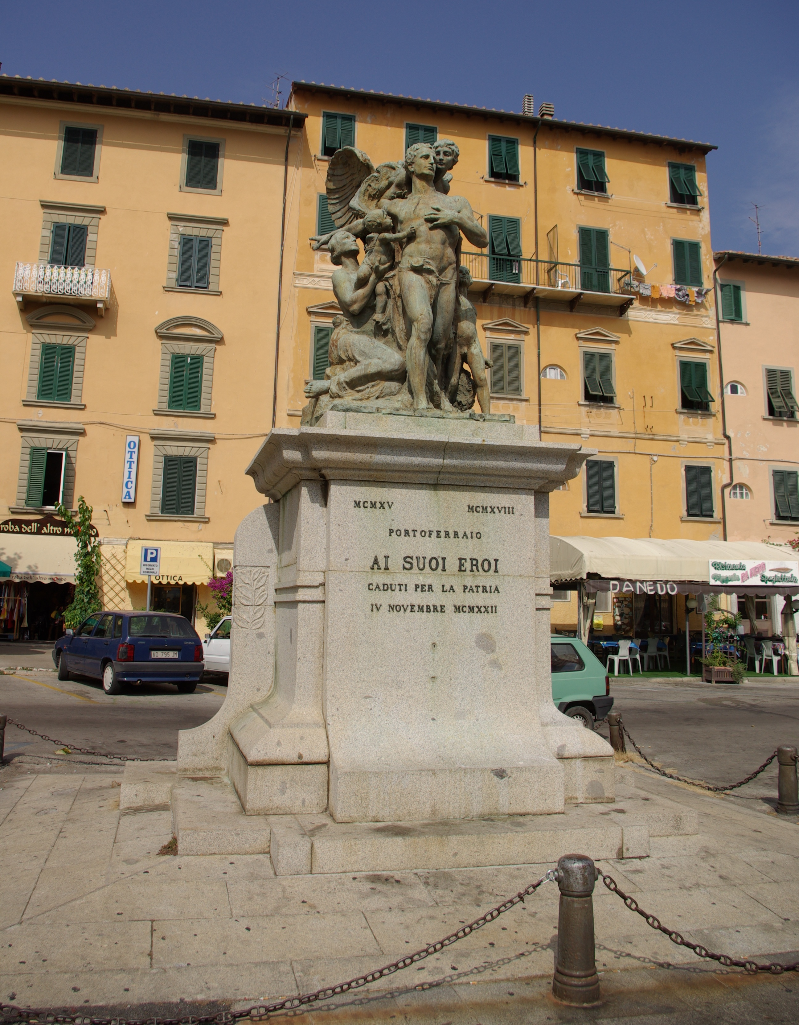 Kriegerdenkmal bei Corrado Feroci in Portoferraio